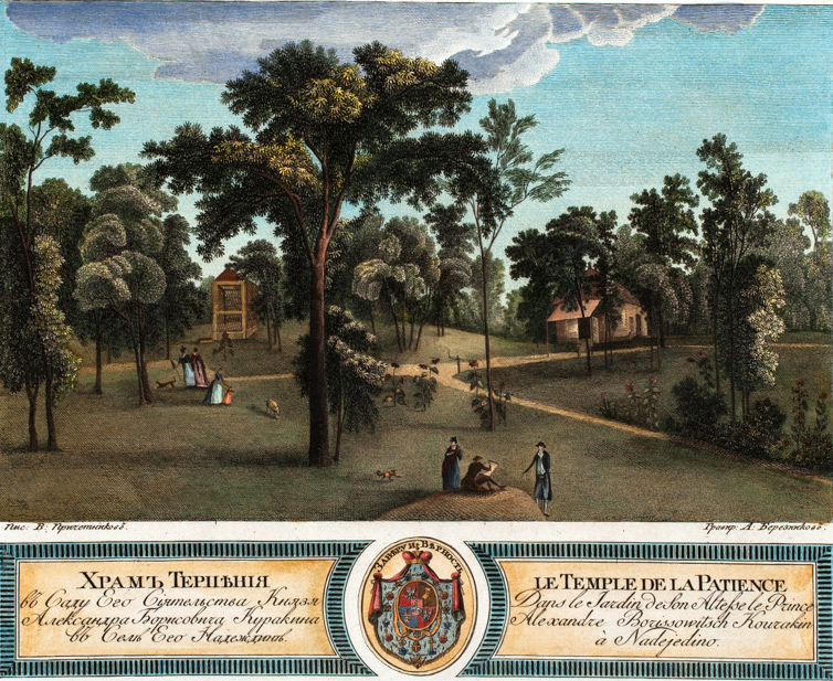 Храм Терпения в Саду Его Сиятельства Князя Александра Борисовича Куракина в Селе Его Надеждине. Гравёр А. Ф. Березников. Пис. В. Причетников.